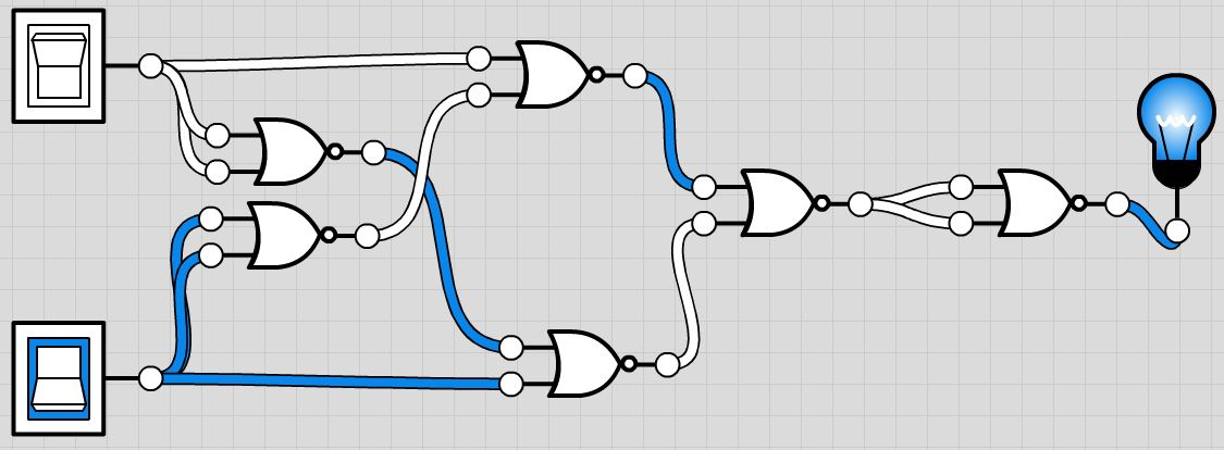 cicuito simmples feito só com nor sem portas desnecessarias